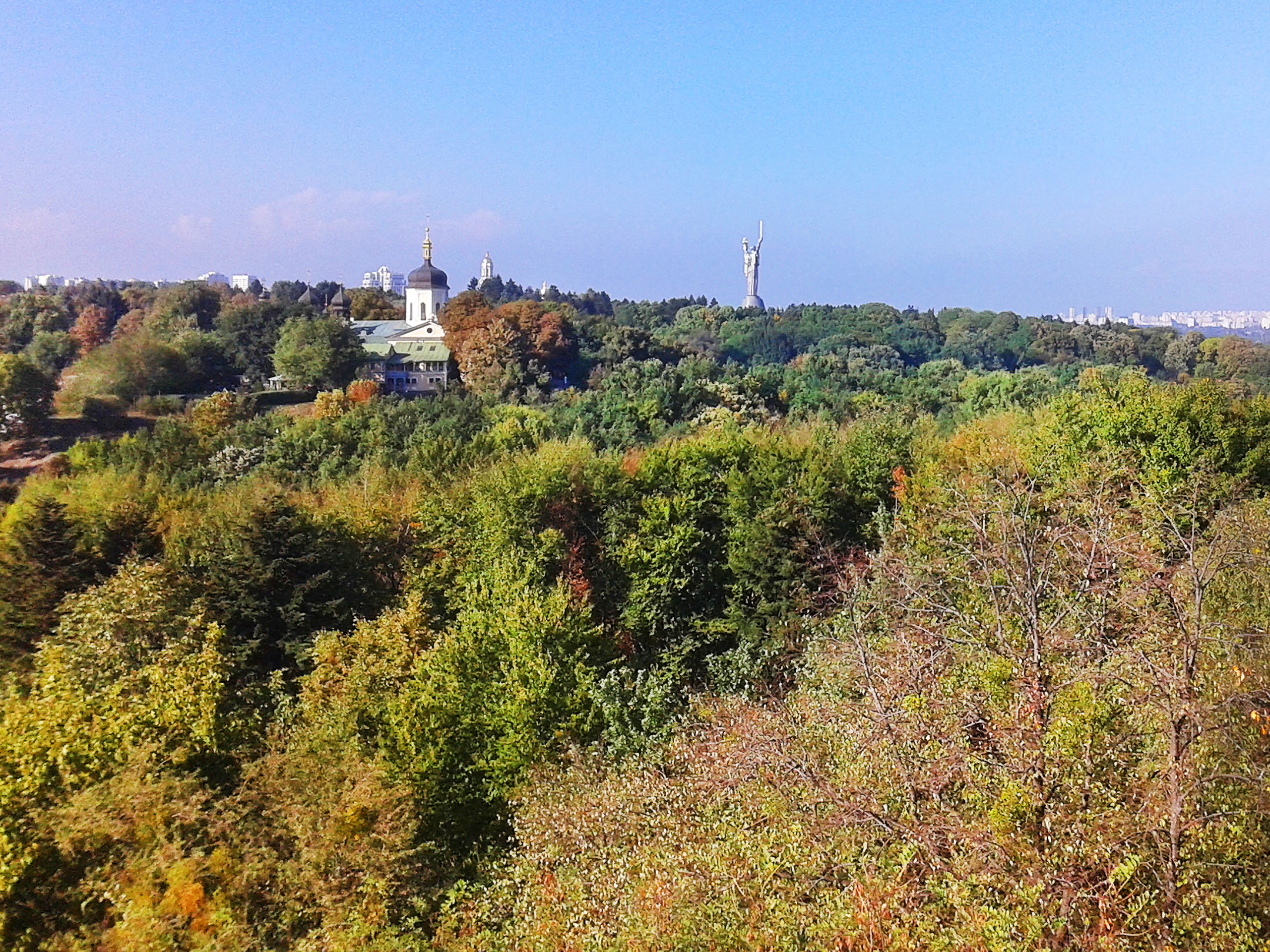 Національний ботанічний сад імені Миколи Гришка НАН України